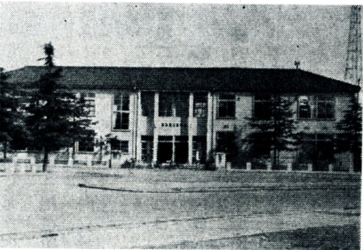 空襲後に再建された富山県立図書館